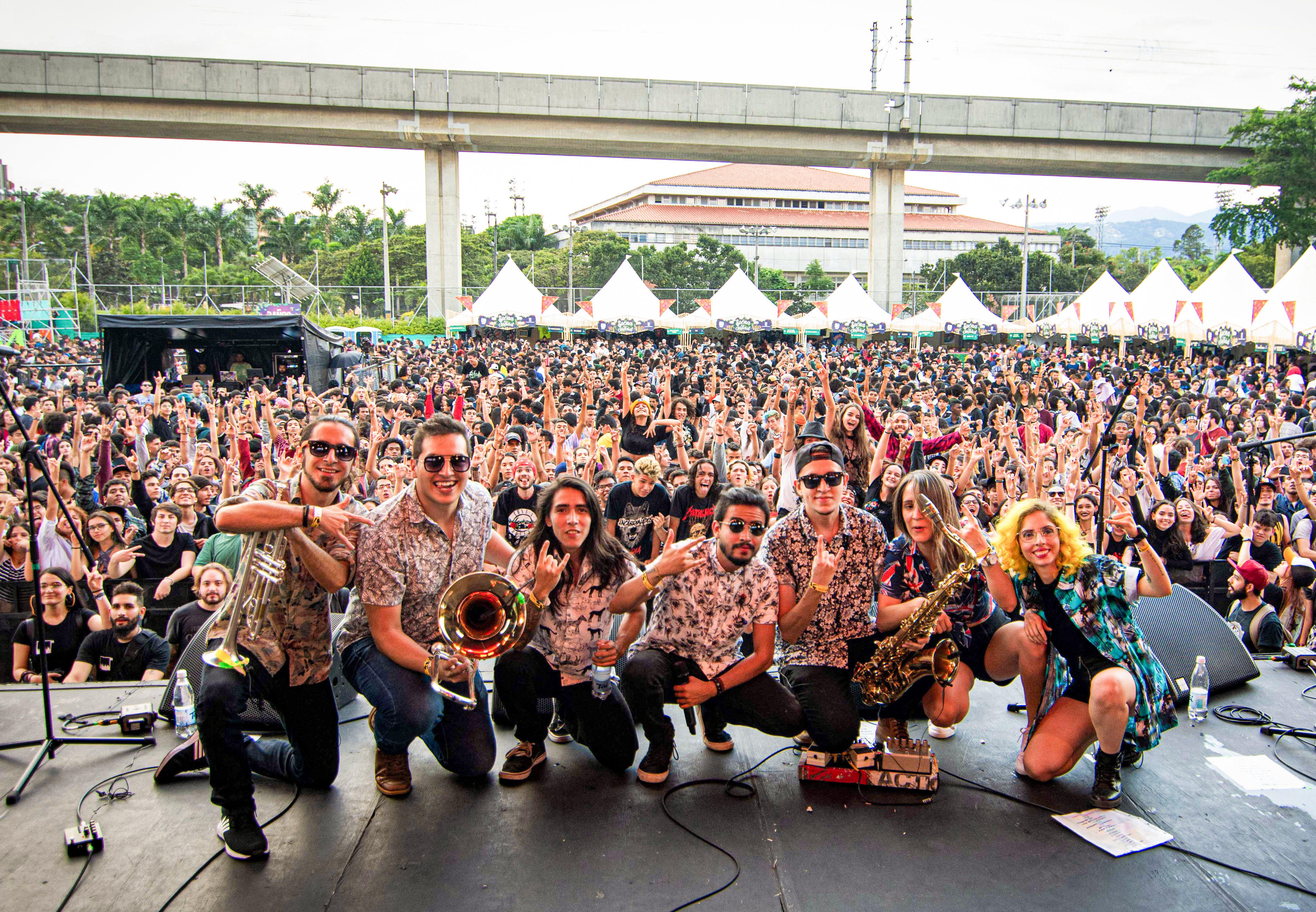 Asuntos Pendientes en 2019.